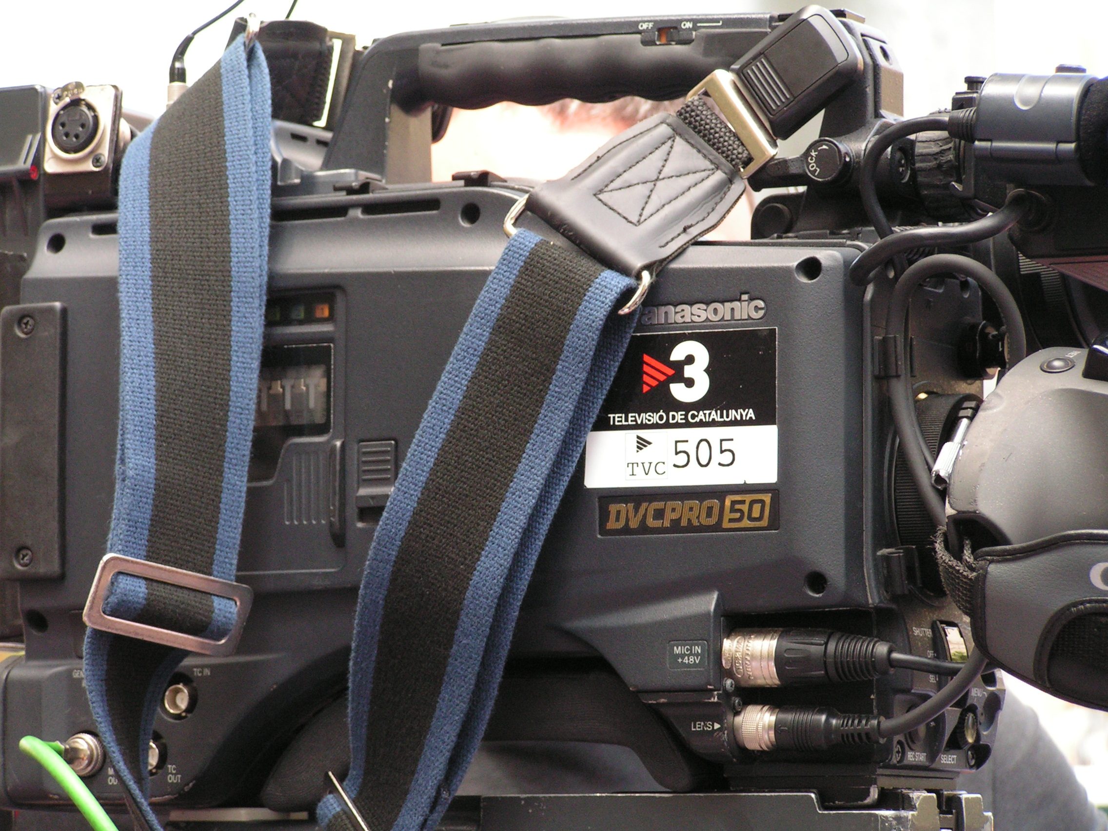 Càmera de TV3 a la manifestació a Amposta, 18 de maig de 2008.